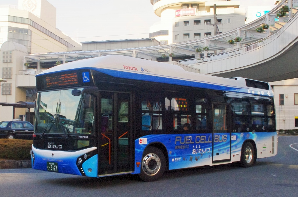 新型燃料電池バス